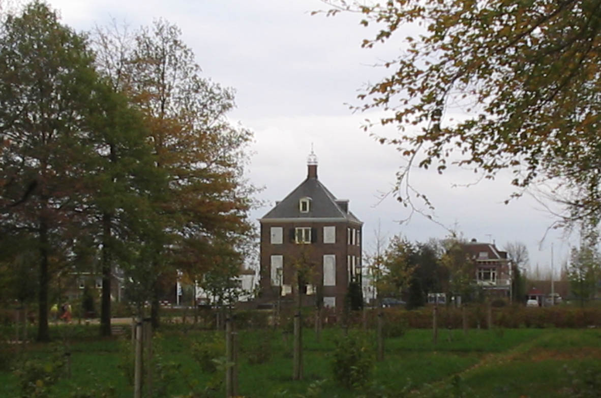 Hofwijck , Voorburg, 9 november 2005